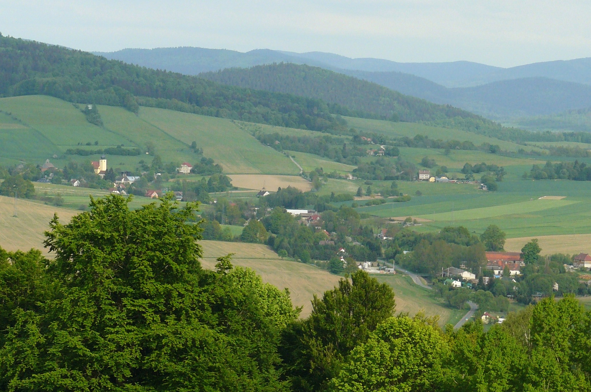 Trzebieszowice - widok.